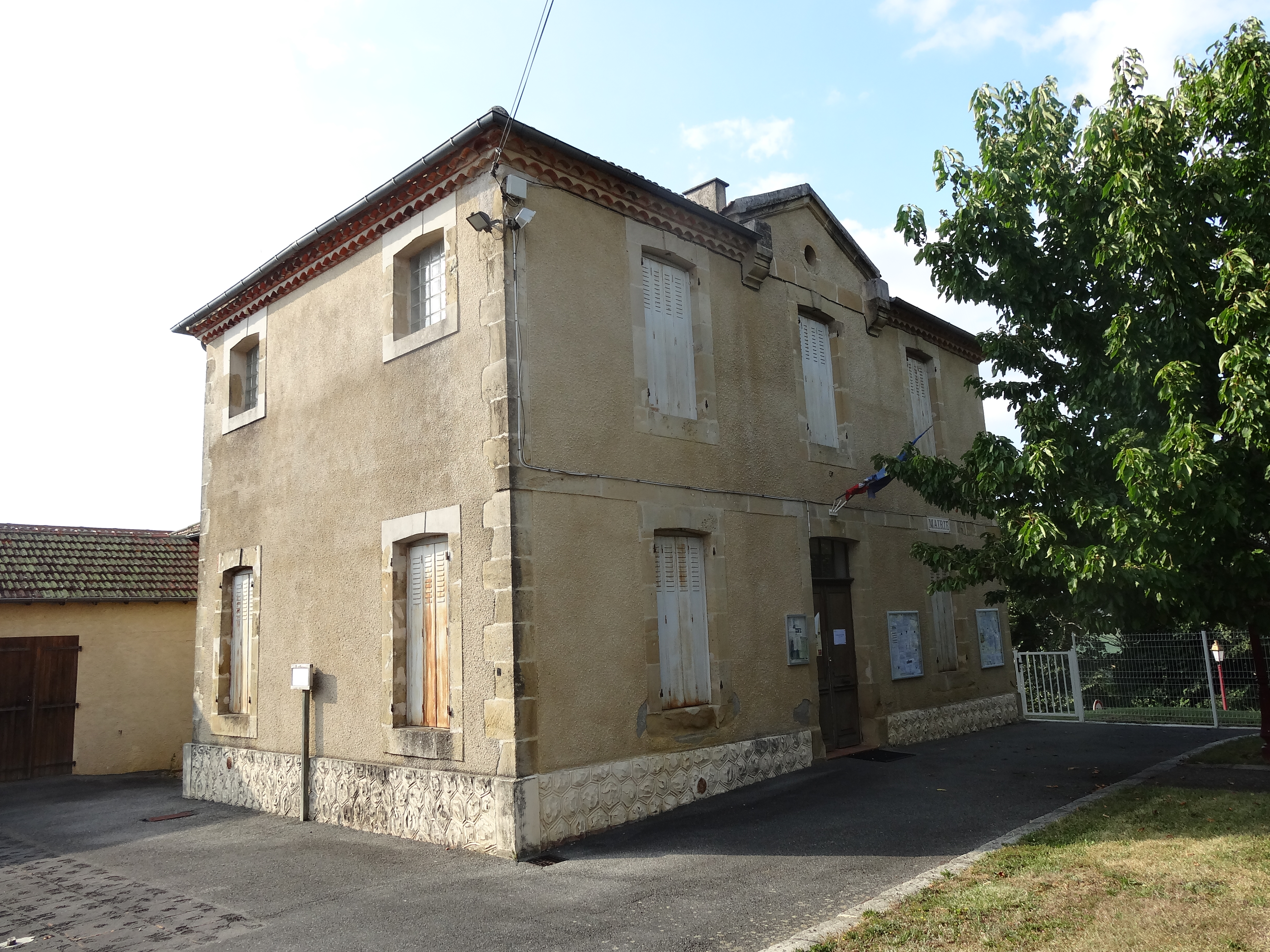 Mairie de Monlezun.